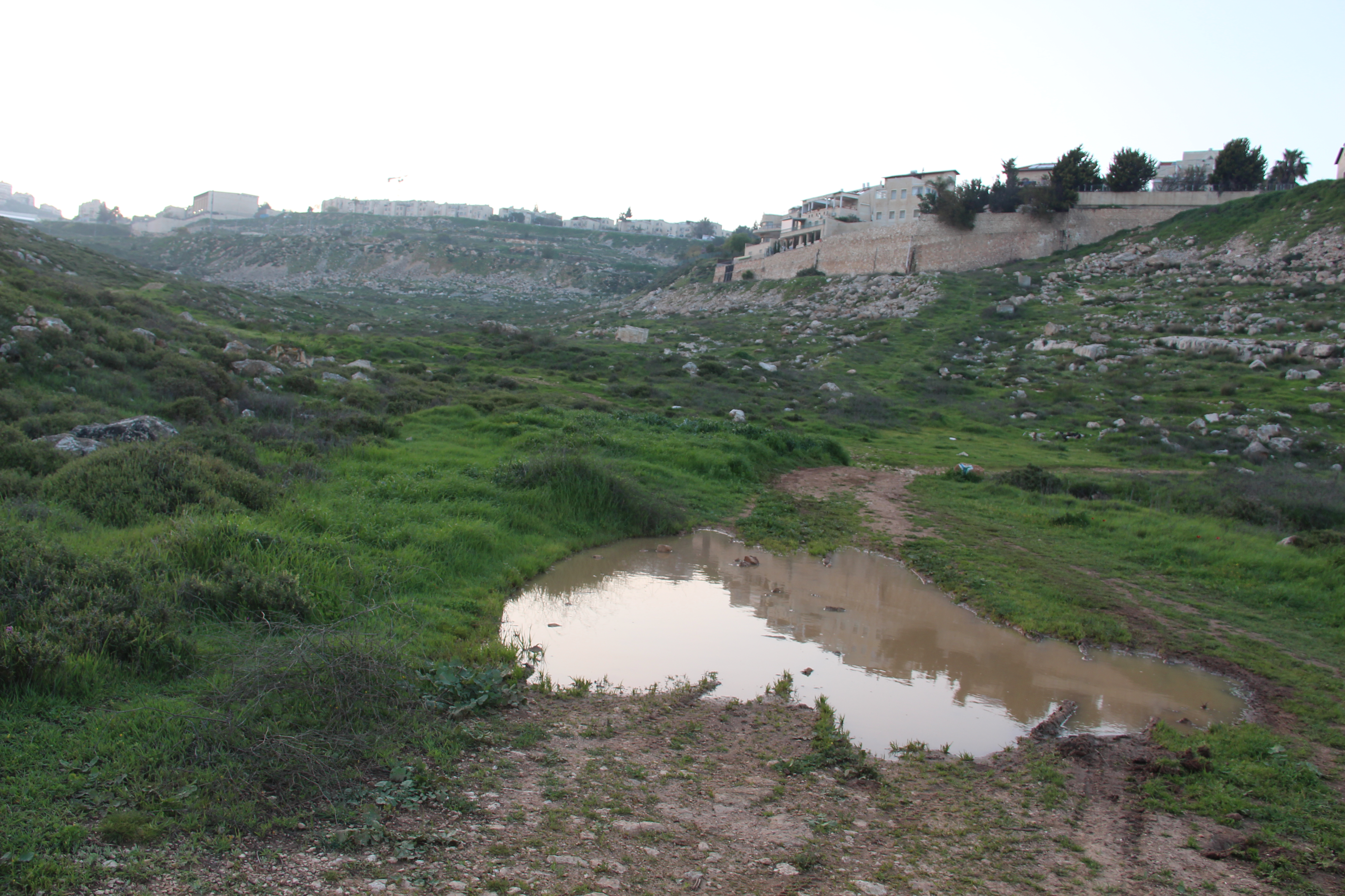 חלק מנחל זמרי ממבט מזרח למערב